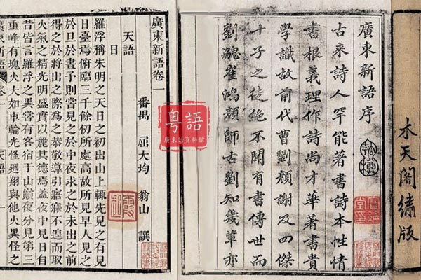 粵語: 廣東新語